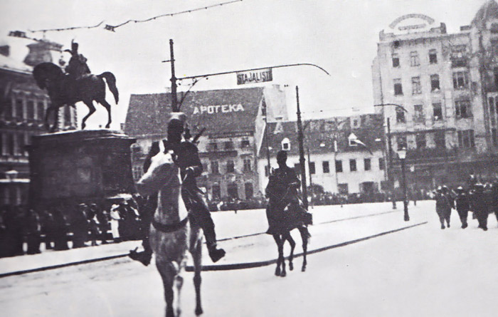 srpska vojska na Trgu bana Jelačića, 1918., na poziv Narodnog vijeća Države SHS